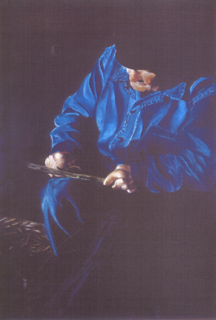 Alvaro Valbuena painting